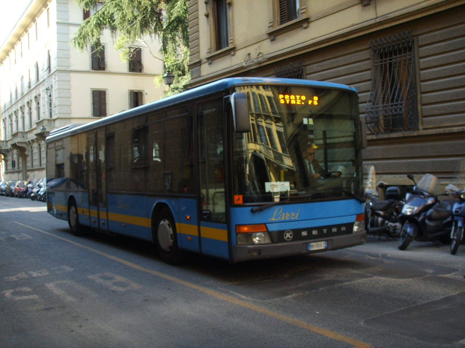 Bus lazzi_piazza_aduain Florence